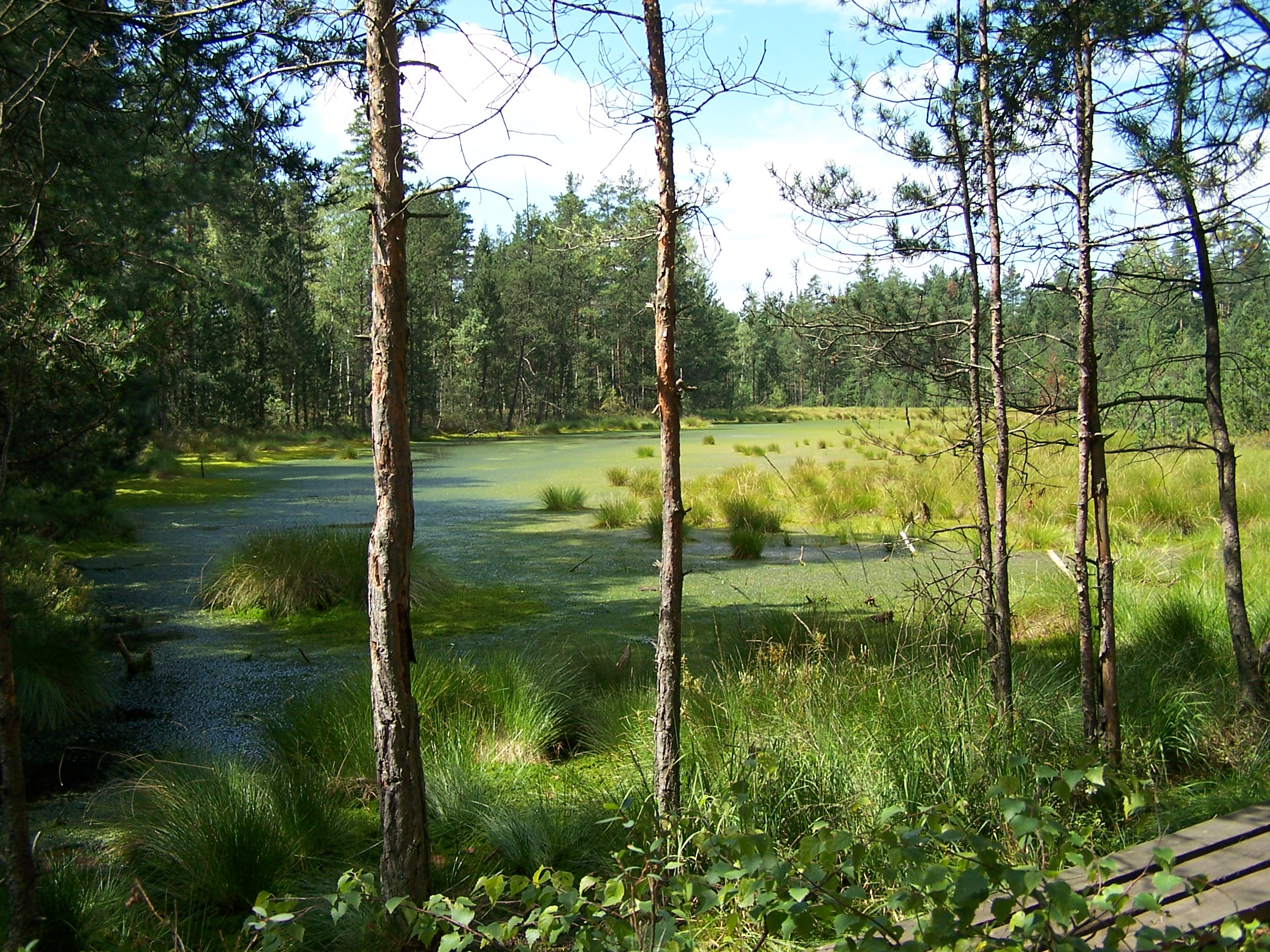 Pohled do vytěženého rašeliniště na Červeném blatu